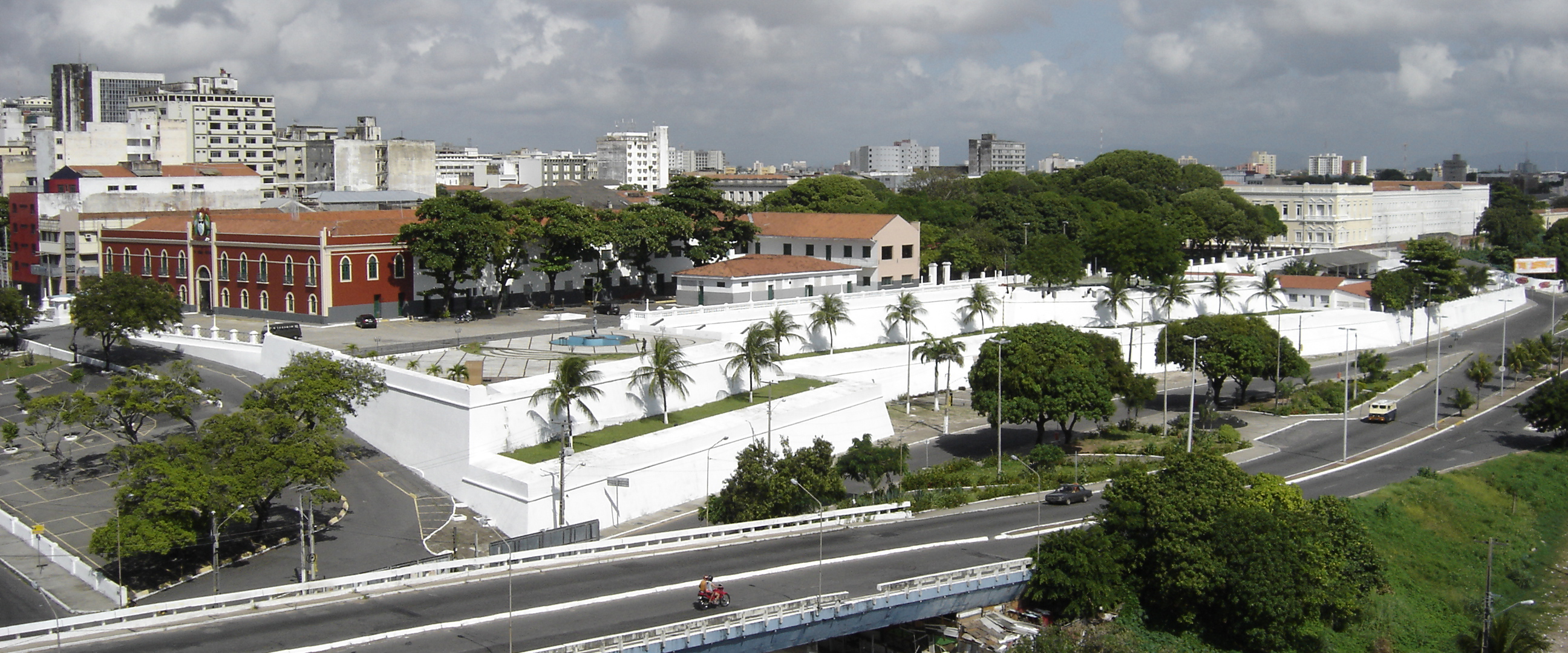 Fortaleza de Nossa Senhora da Assunção, com o Material de Artilharia Composto pelos Canhões de n. 01 a 06, e pelo Antigo Quartel da Guarnição do Ceará, Atual Quartel da 10ª Região Militar